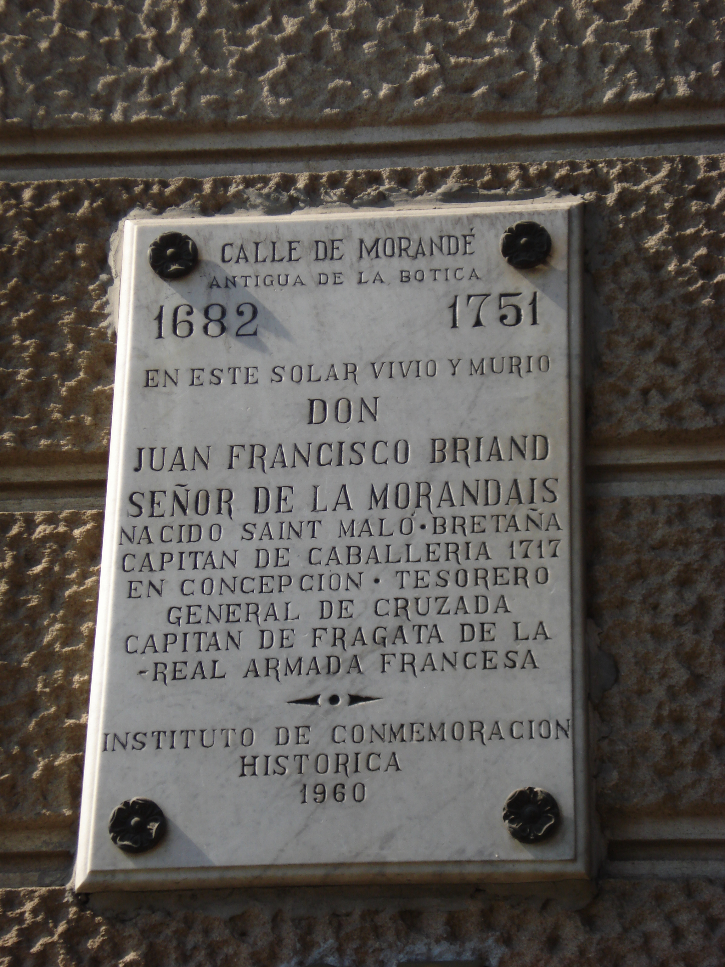 Placa en la calle Morandé (antigua calle de la Botica) colocada en el exterior del edificio de la Intendencia Metropolitana de Santiago de Chile. El texto de la placa recordatoria dice: "En este solar vivió y murió don Juan Francisco Briand de la Morandais, nacido en Saint - Malo, Bretaña. Capitán de Caballería 1717 en Concepción; tesorero de la cruzada. Capitán de fragata de la Real Armada francesa. (16821751). Instituto de Conmemoración Histórica, 1962."